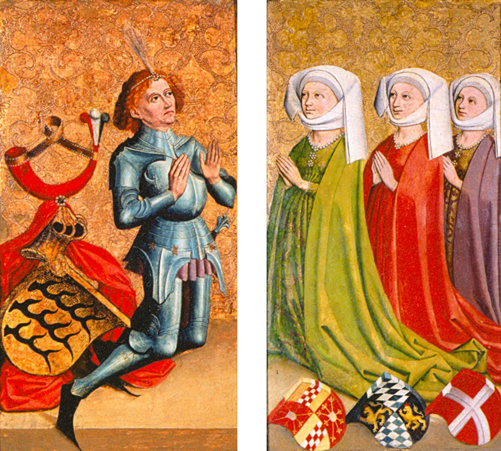 Ulrich der Vielgeliebte und seine drei Gemahlinnen Margarethe von Cleve, Elisabeth von Bayern-Landshut und Margarethe von Savoyen; Stuttgart, aus der Stiftskirche in Stuttgart (?)